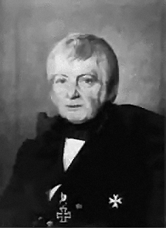 Porträt von Ludwig Freiherr von Vincke.